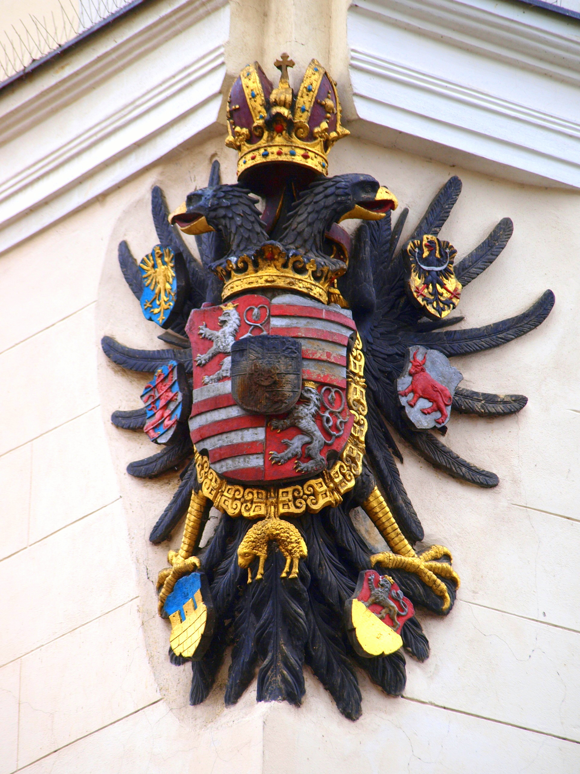 Znak Rakouského císařství na domě v Praze